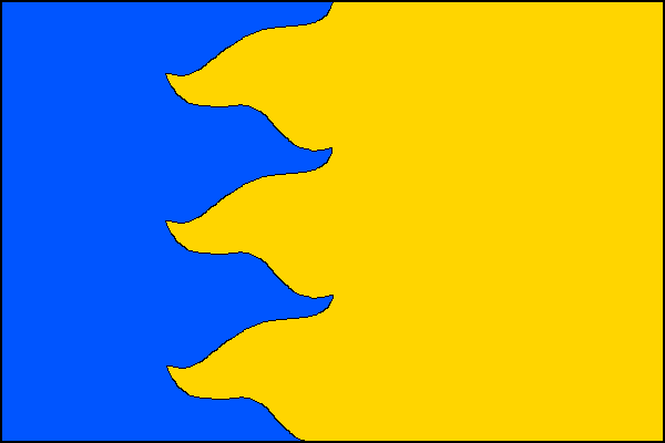 vlajka, Rožná, okres Žďár nad Sázavou